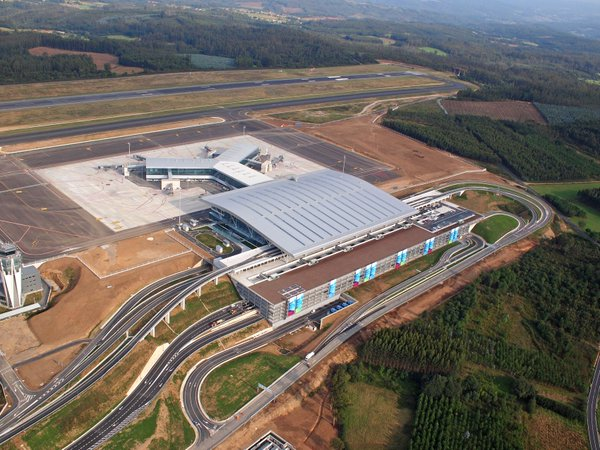 Vista aérea de la nueva terminal de pasajeros del aeropuerto de Santiago de Compostela